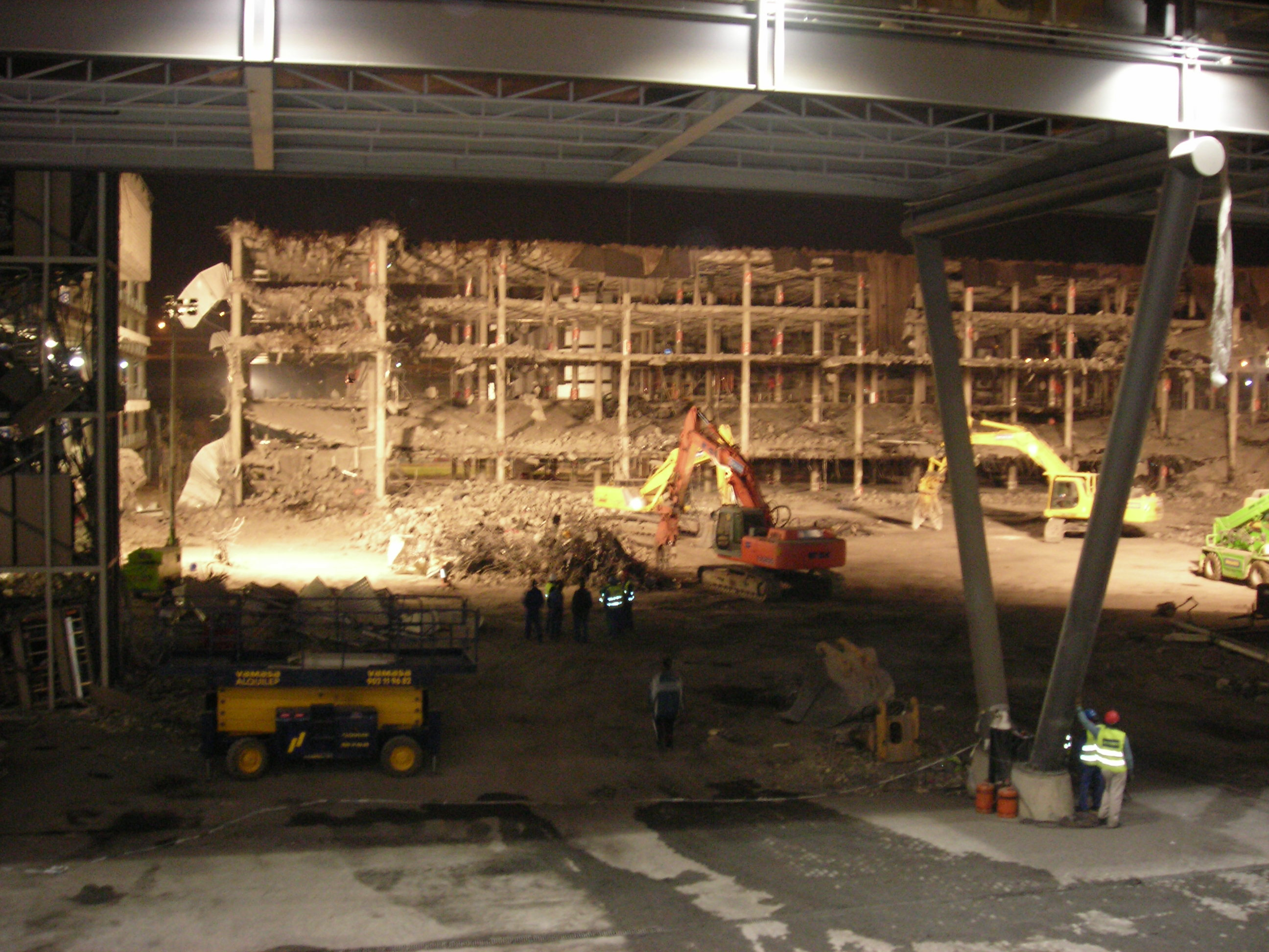 Párking de la T4 (Madrid-Barajas) días después del atentado de ETA del 30 de diciembre de 2006